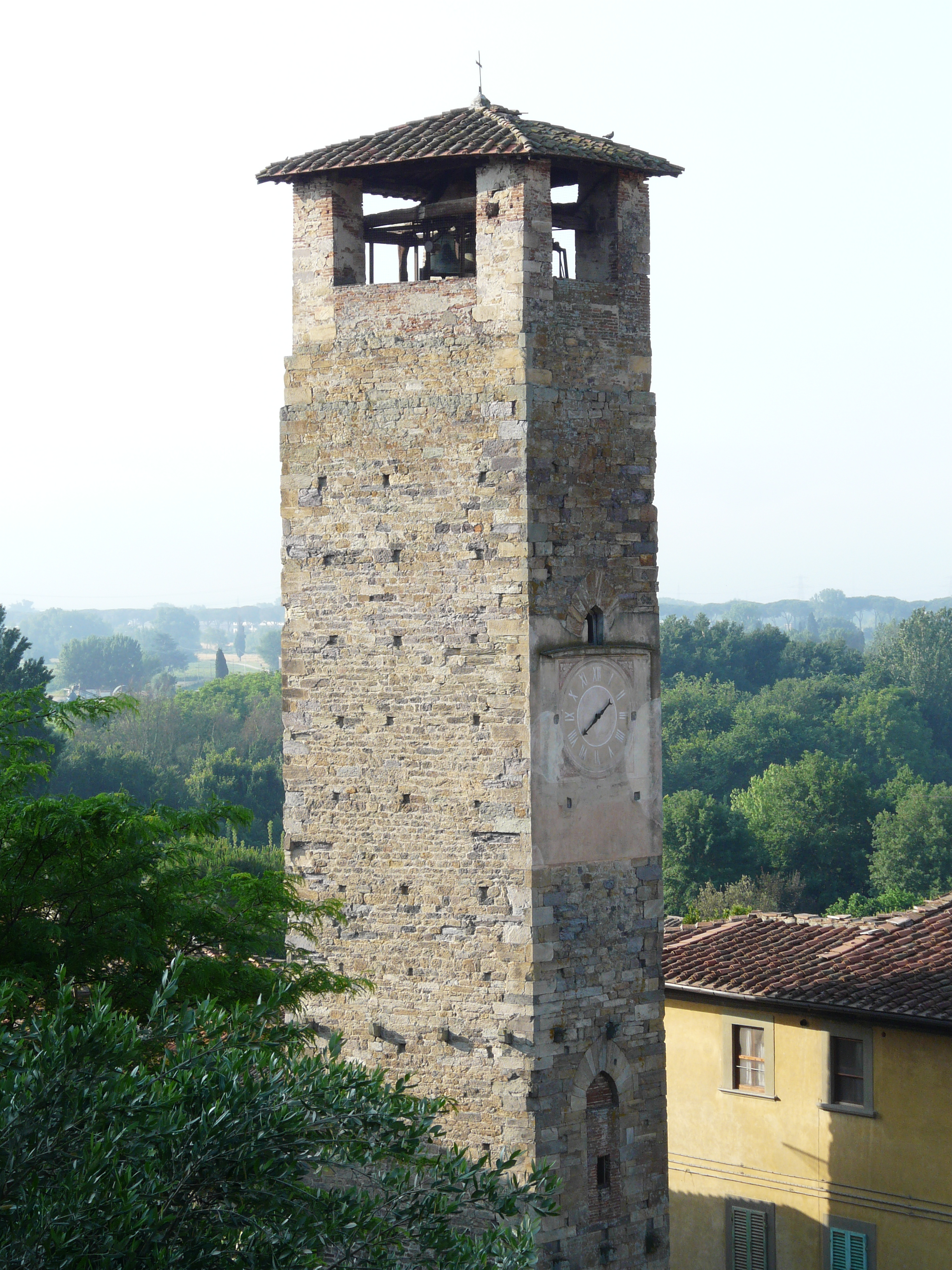 Torre dell'Orologio, Comune di Vicopisano, Toscana, Italia